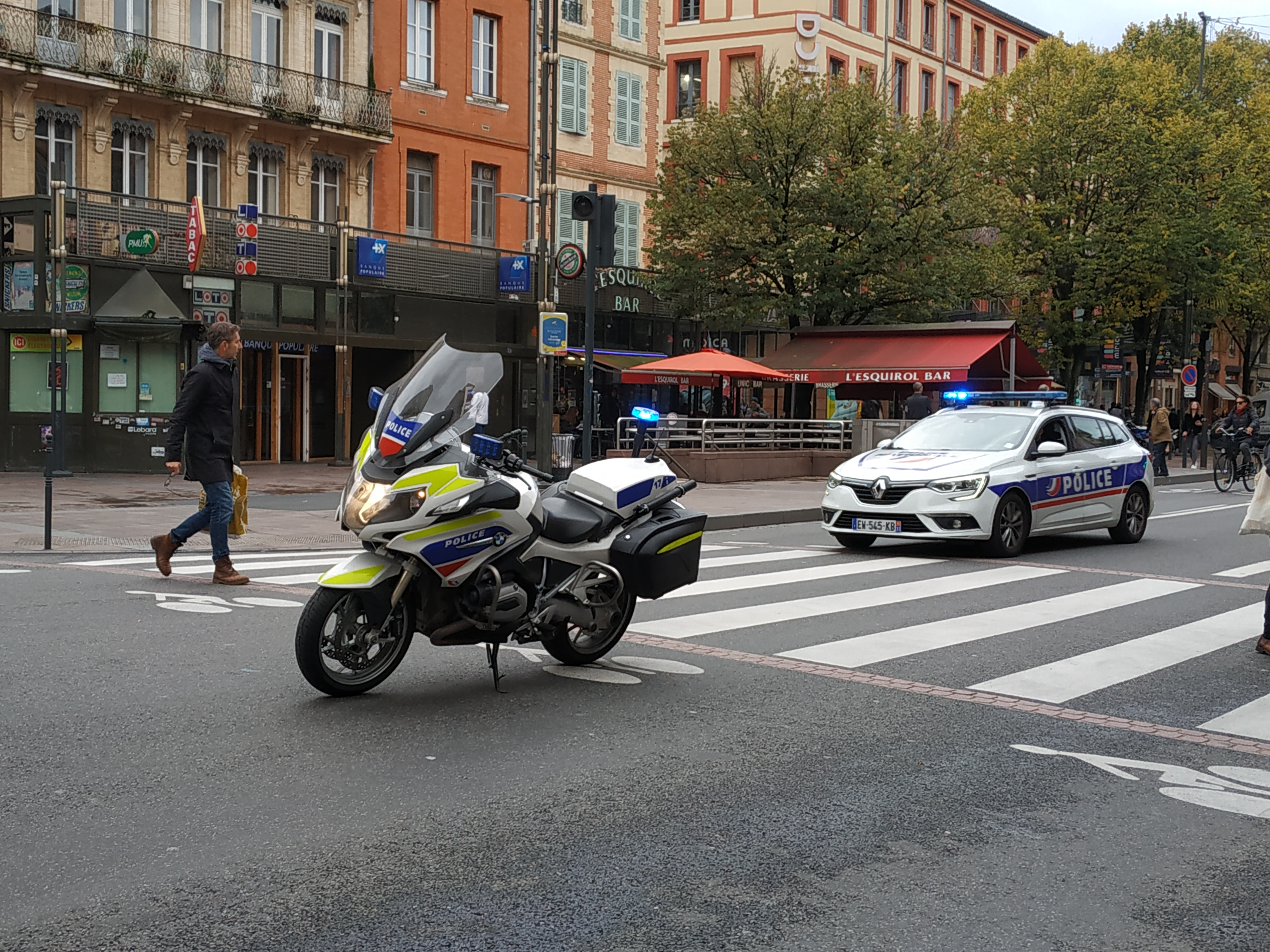 BMW R1200RT & Renault Mégane de la police nationale lors d'une manifestation à Toulouse